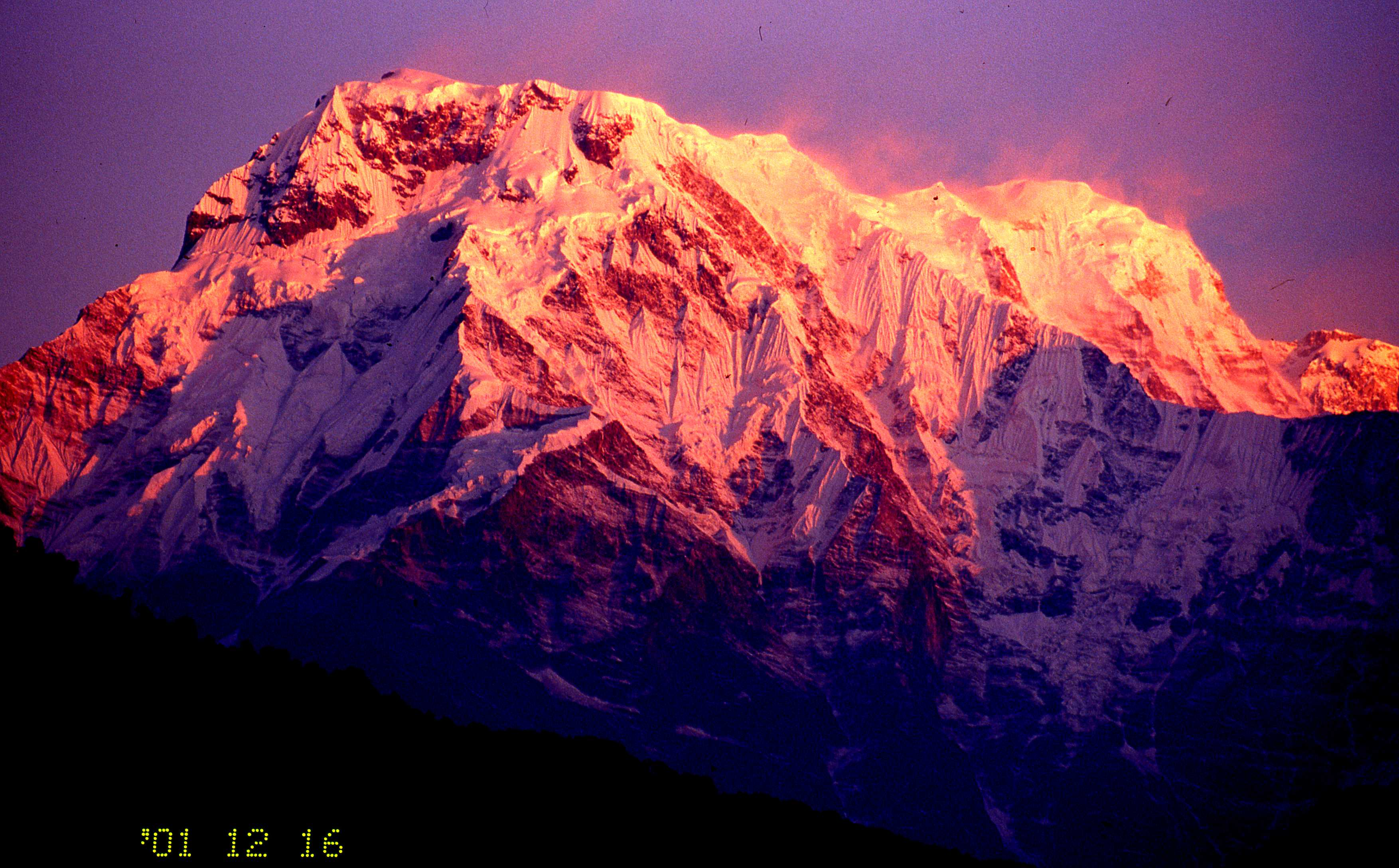 アンナプルナⅢ、マチャプチャレ ～photo by Autumn Snake 【おぉたむ すねィく探検隊】写真部門 担当 大原佳苗